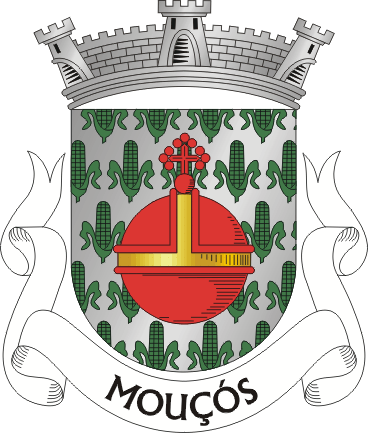 Brasão da freguesia de Mouçós (concelho de Vila Real)